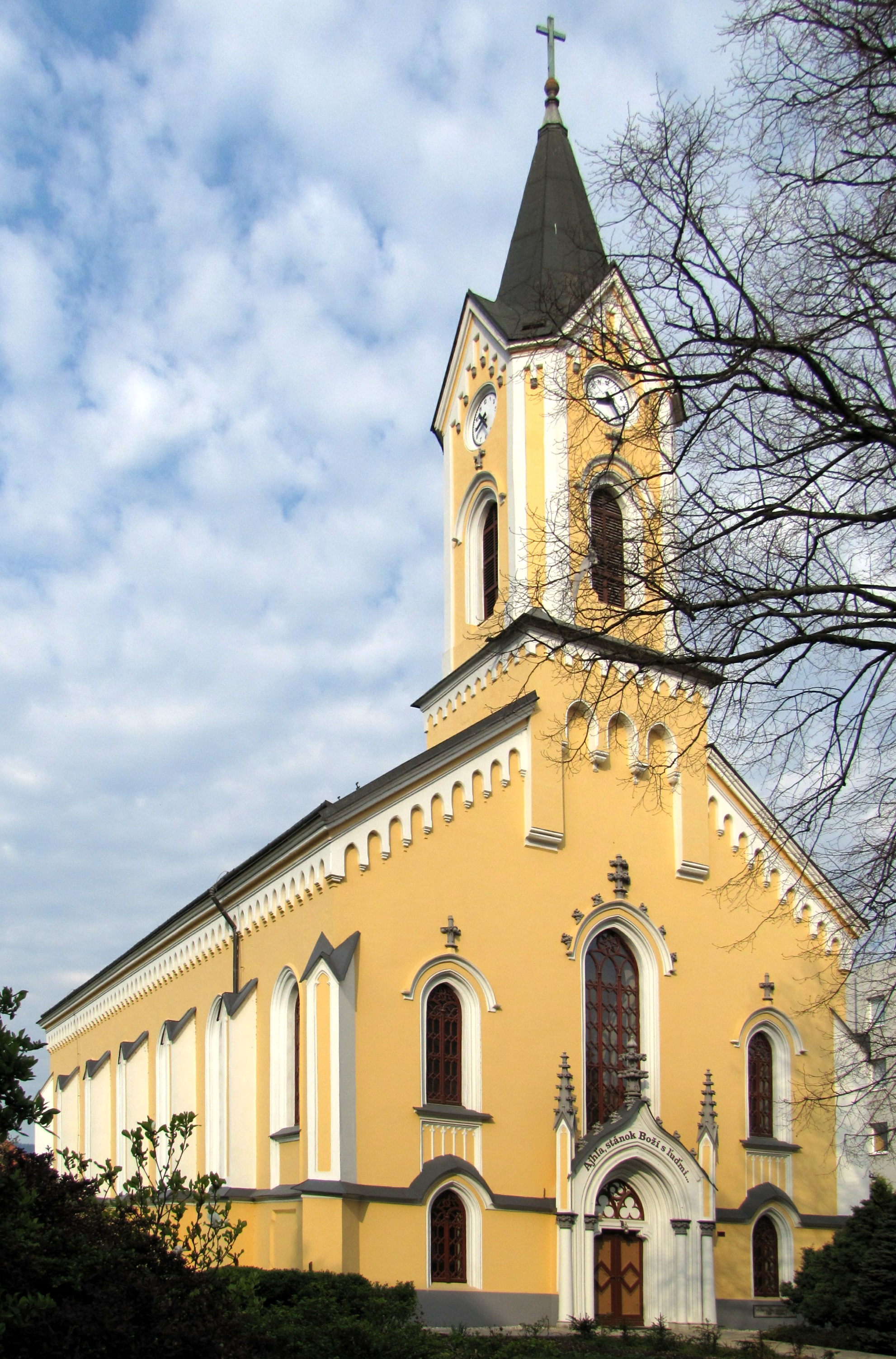 Novogotický kostel Evangelické církve augsburského vyznání v Púchově z roku 1880